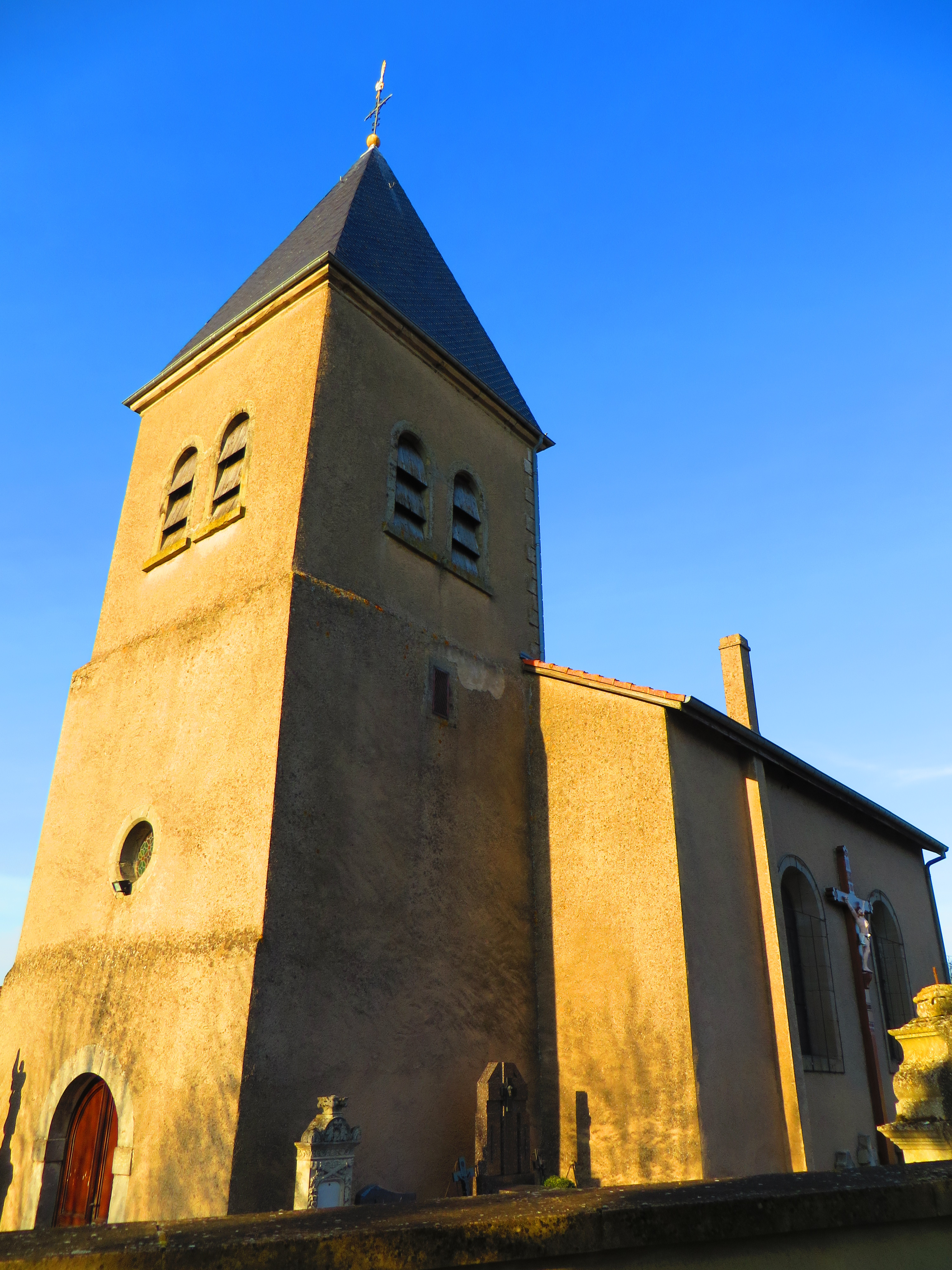 Riche Église Saint-Étienne